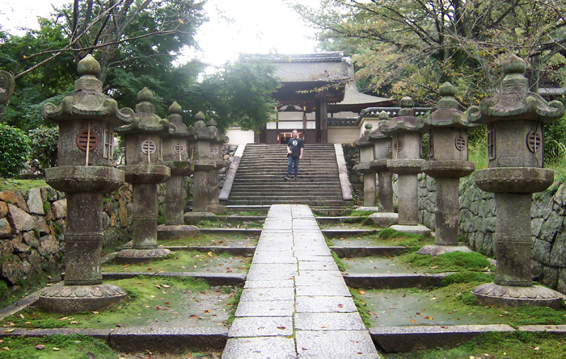 Some picturesque steps at Miidera temple in Shiga, Japan